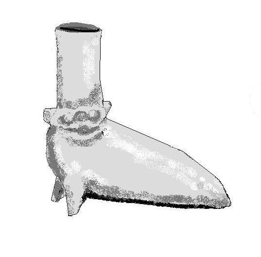 Paint.